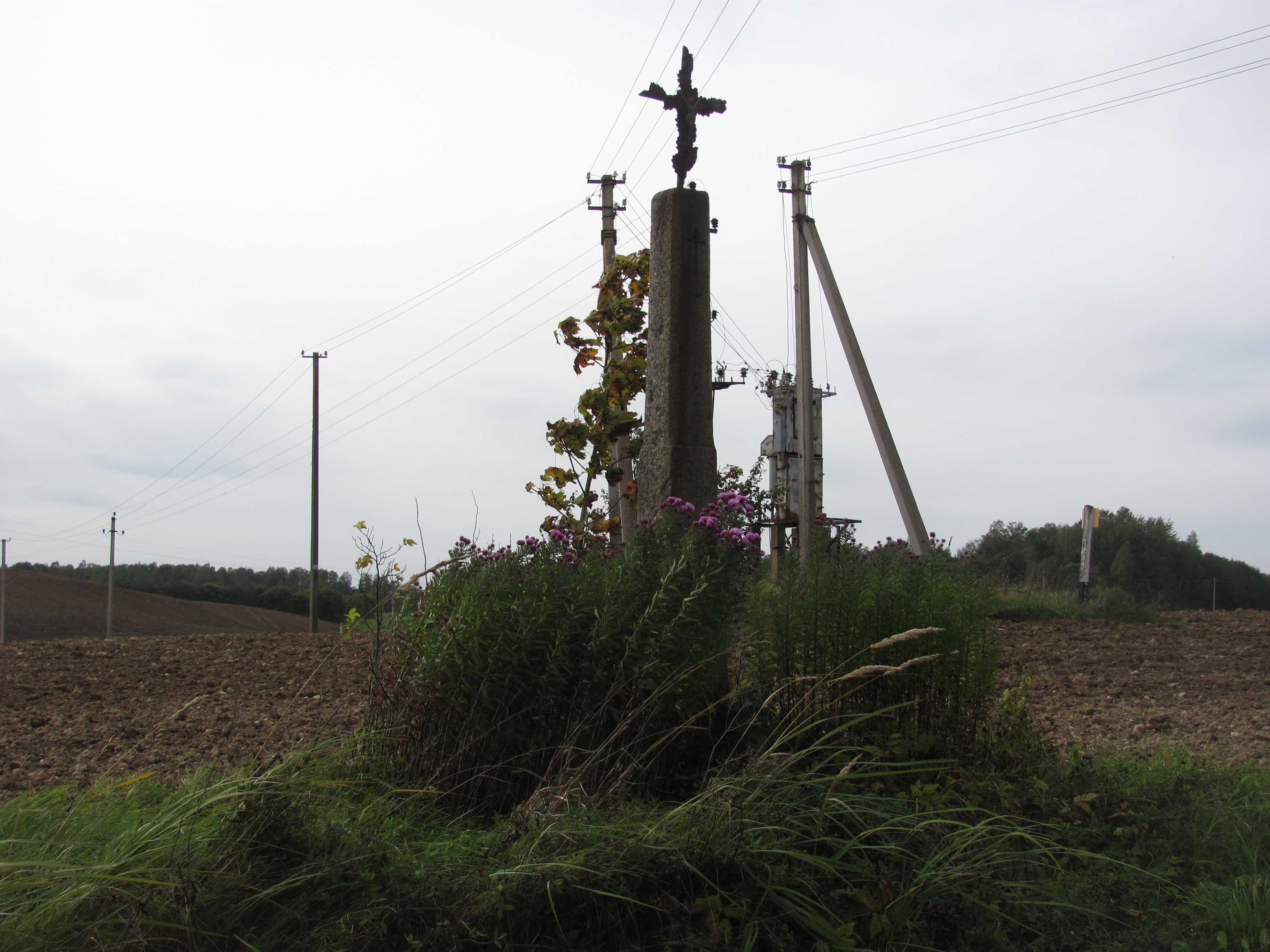 Tauragnų sen., Lithuania